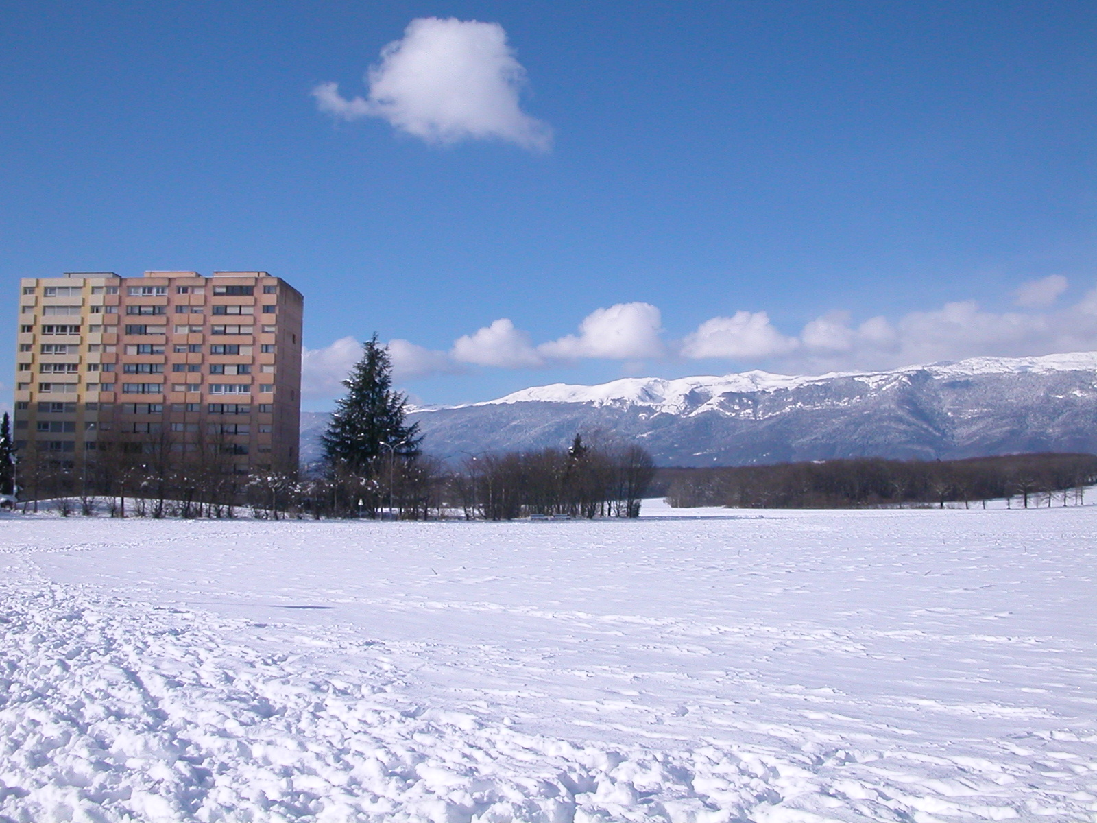 Immeubles de Meyrin sous la neige